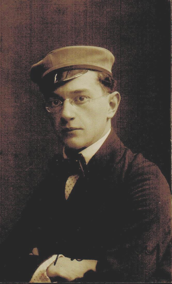 Porträtaufnahme von René Rainer Fetscher als Student in Tübingen